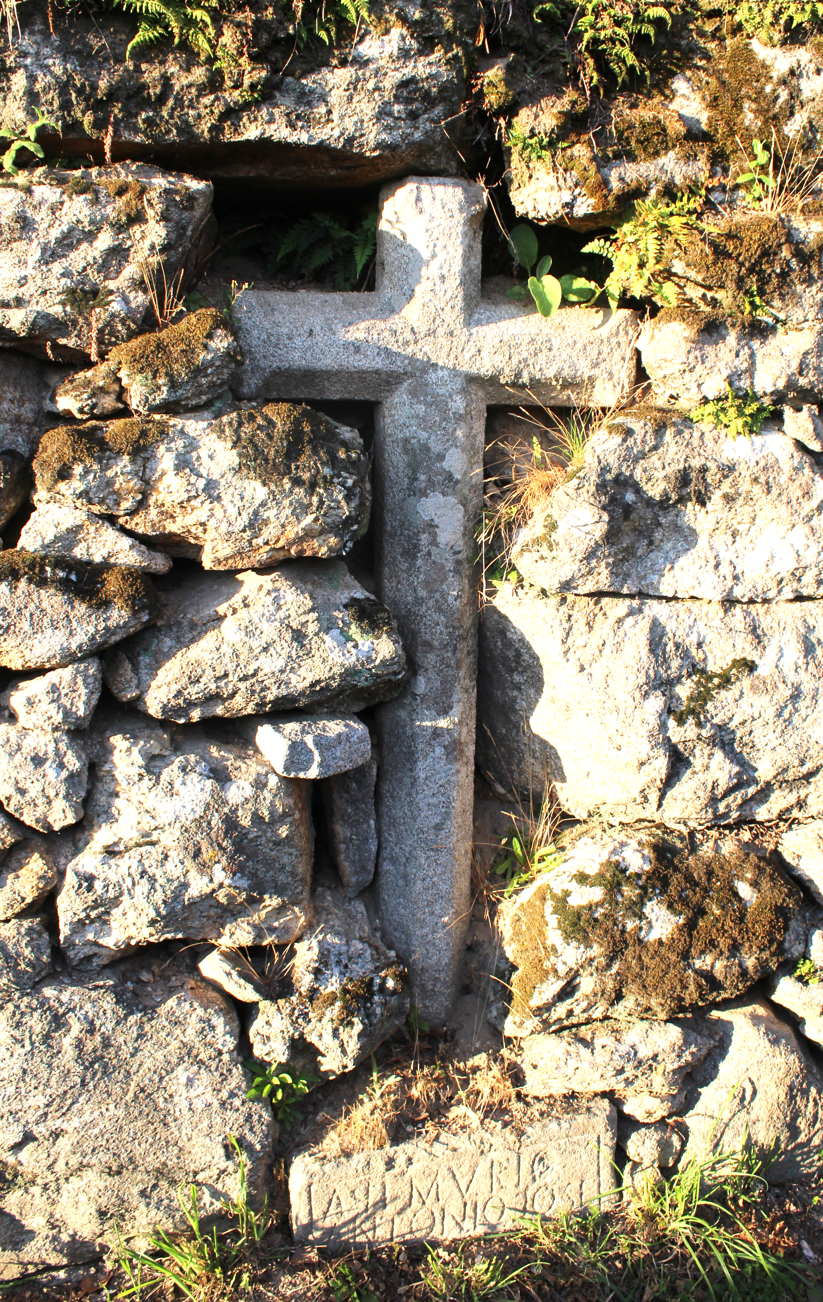 Cruz de mala morte situada no entorno da casa Baludío, na Texosa, parroquia de Mañufe, concello de Gondomar